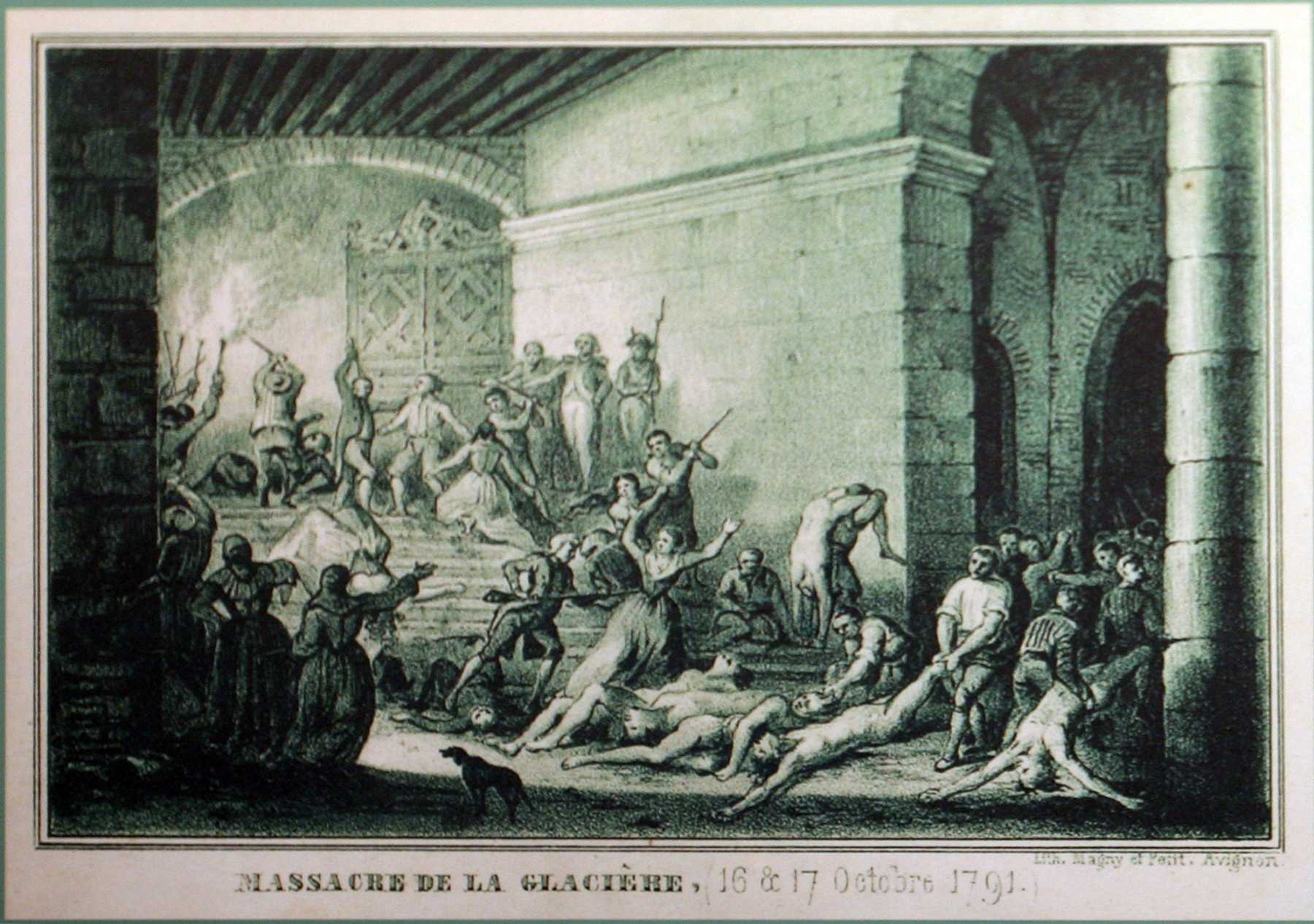 Illustration du massacre de la glacière - Palais des Papes, Avignon, Vaucluse, France